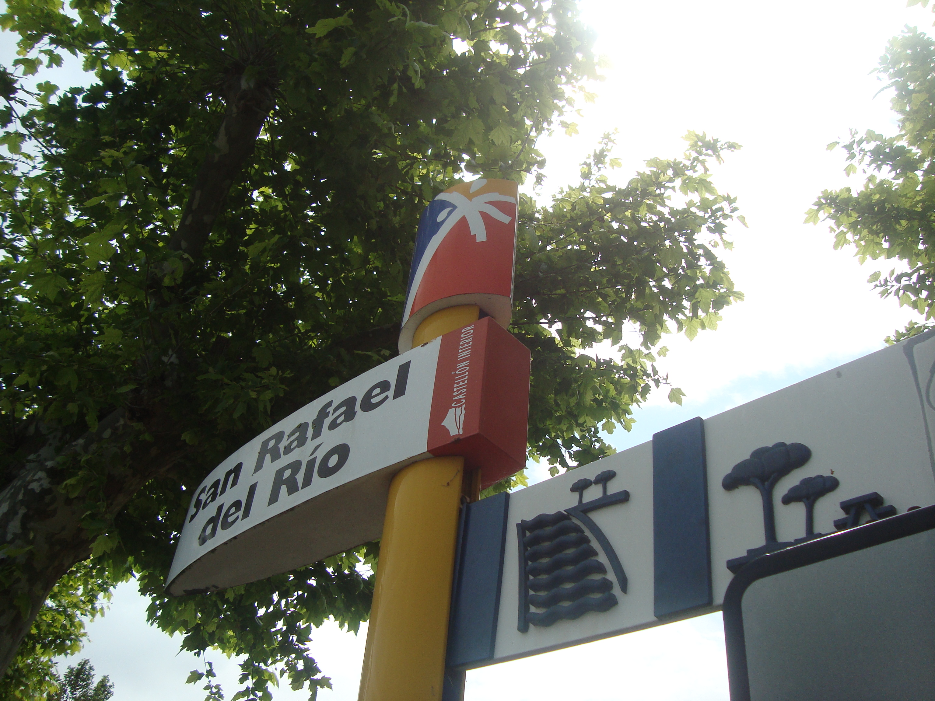 San Rafael del Río